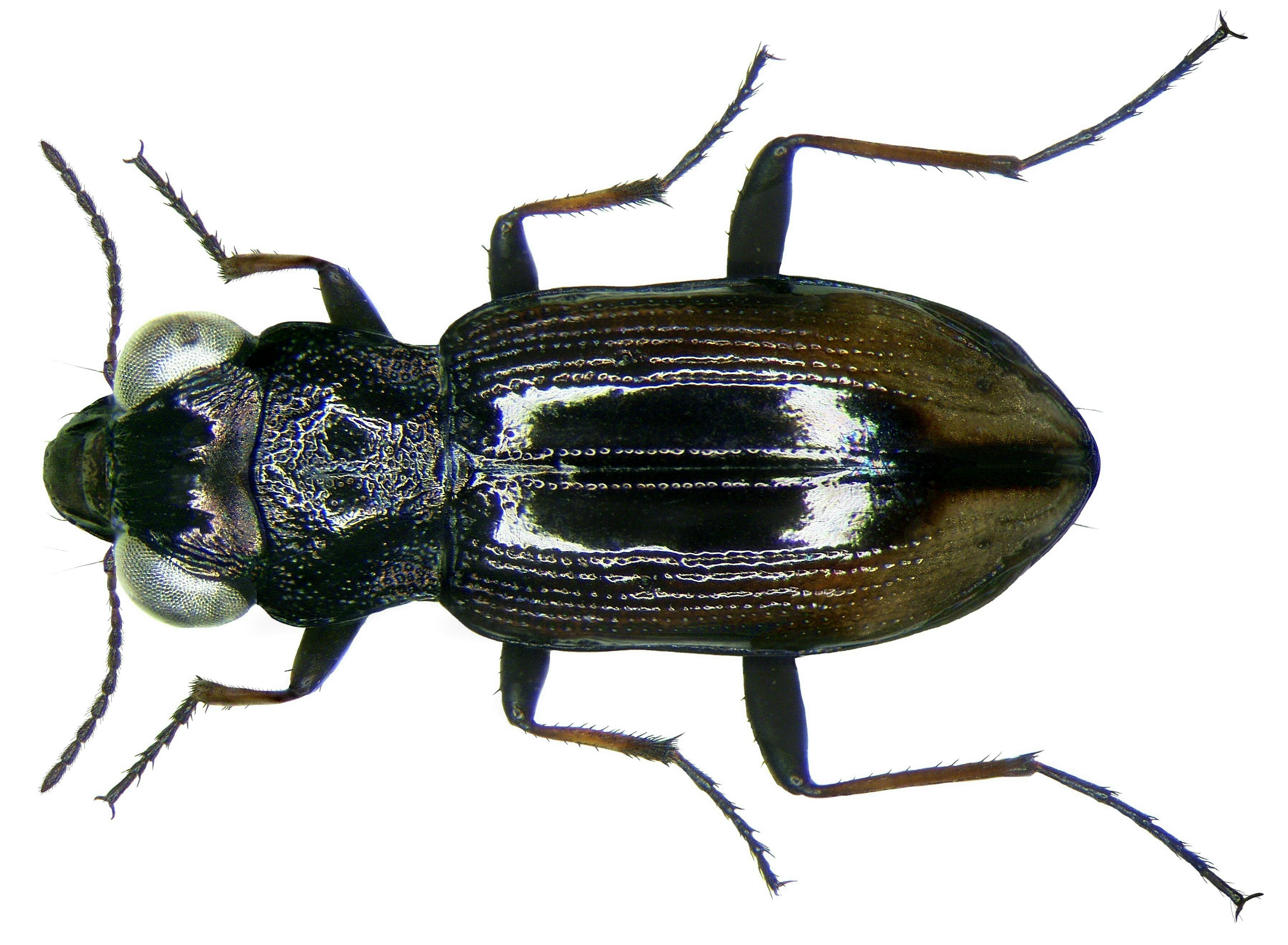 Familie: Carabidae Größe: 3,5-5,5 mm Verbreitung:Westpalaearktische Art Ökologie: flinke Läufer, tagaktiv Fundort: Germania, Oberfranken, Kulmbach leg.det. U.Schmidt, 1972 Foto: U.Schmidt, 2008